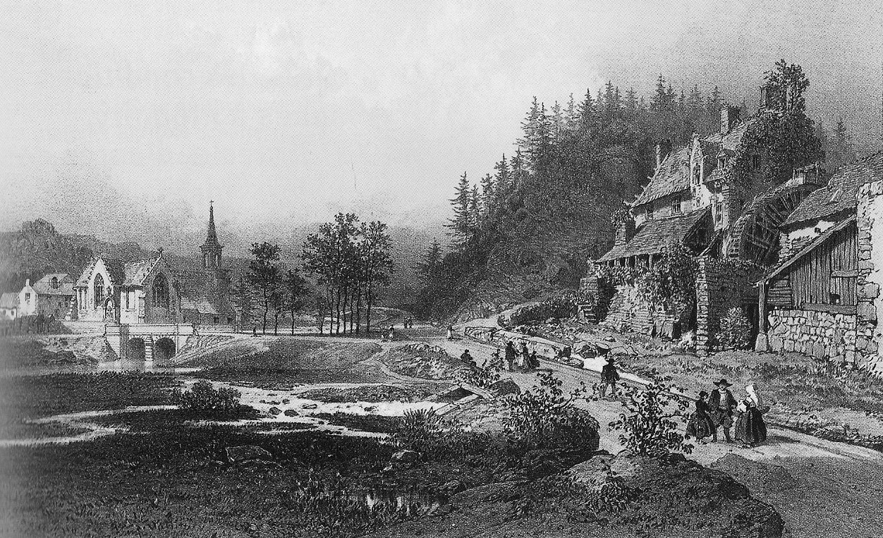 Moulin et église de Pont-Christ (par Eugène Ciceri [1813-1890])